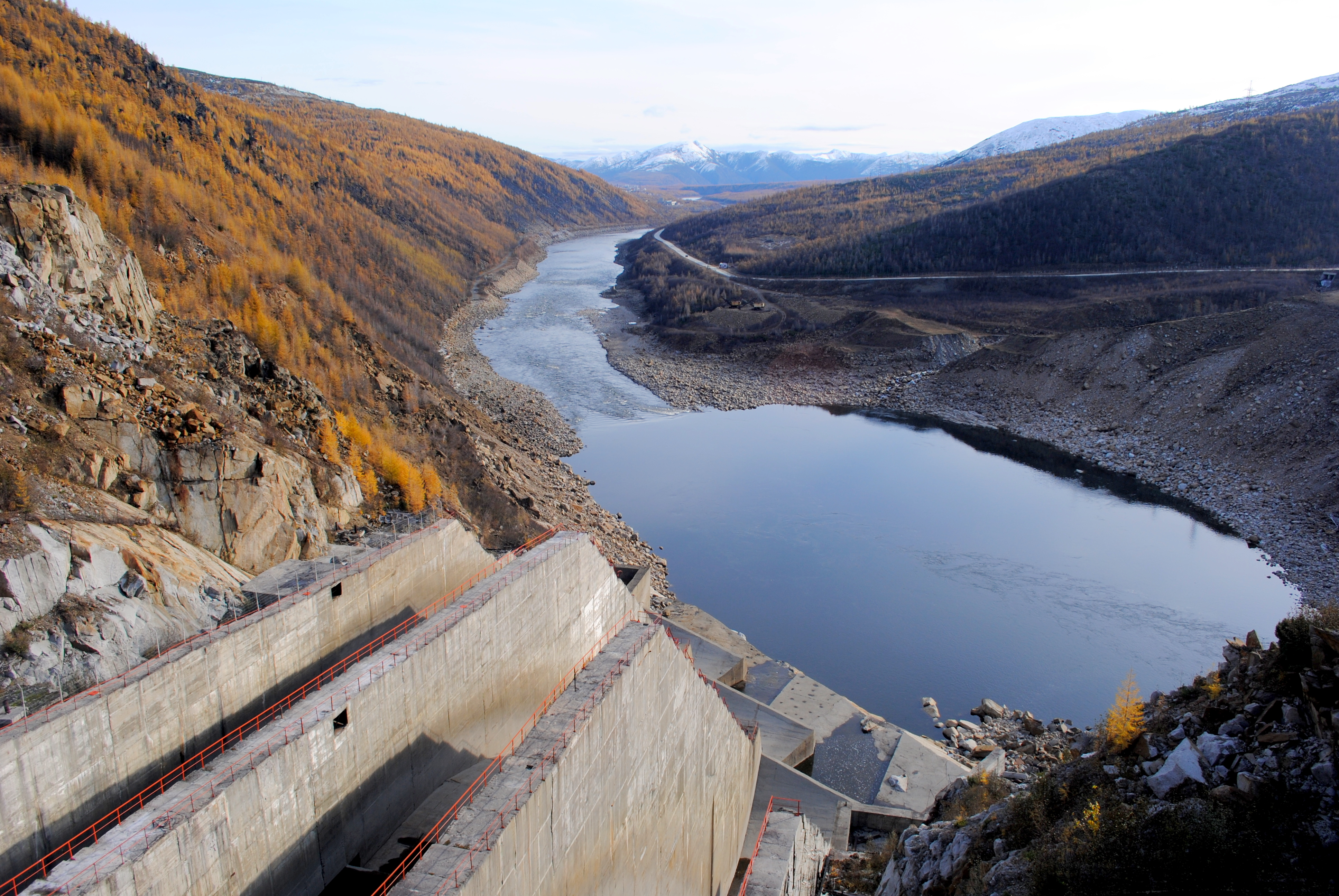 Водосброс Колымской ГЭС. Вид в нижний бьеф на яму размыва.